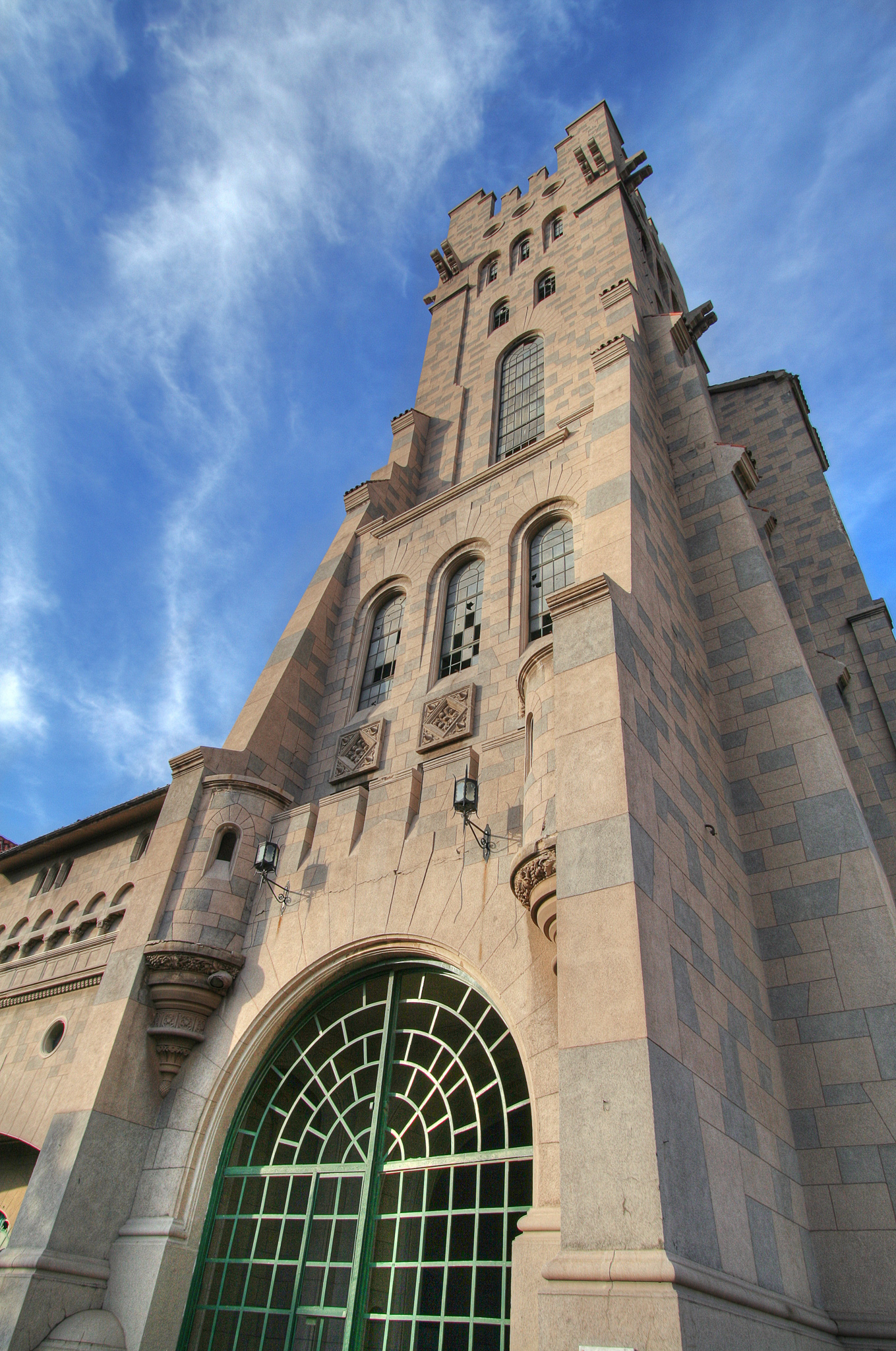 Usina General San Martín